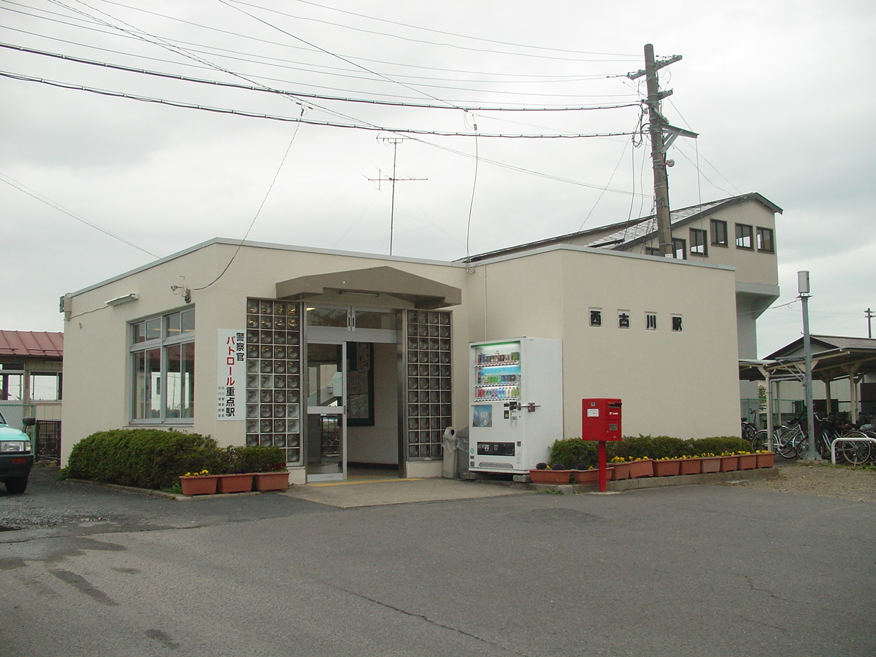 （西古川駅）